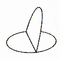 Конструкция вставного клапана для трюка "Кролик в цилиндре"